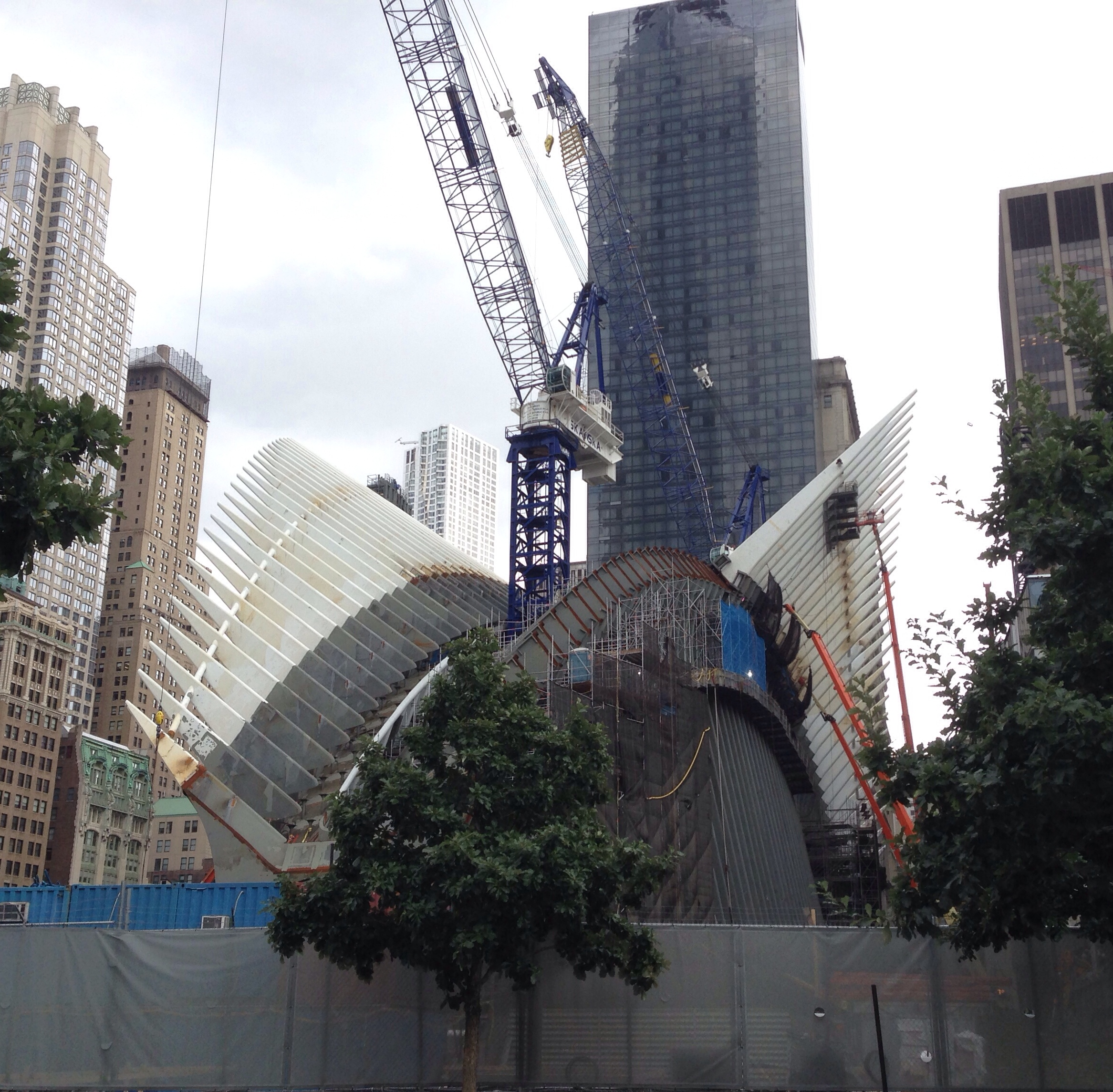 PATH hub rising, Sep 2014